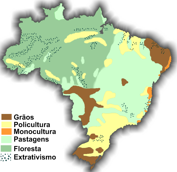 Mapa representativo do uso agrícola no território brasileiro